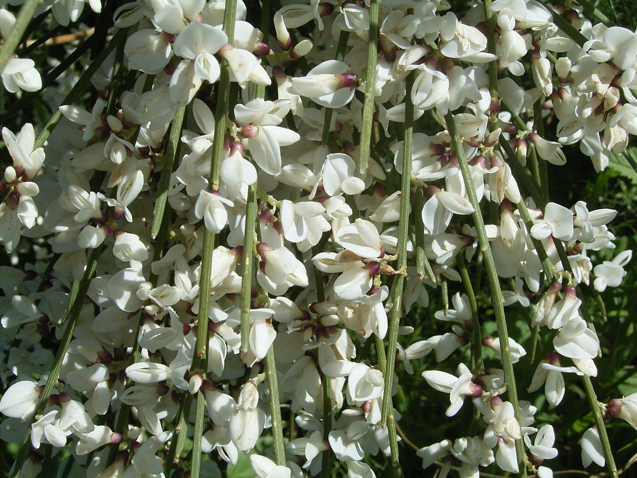 Retama raetam growing in Puntagorda, La Palma, Canary Islands